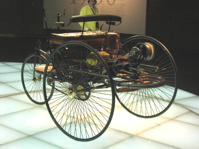 Benz Patentmotorwagen 1886